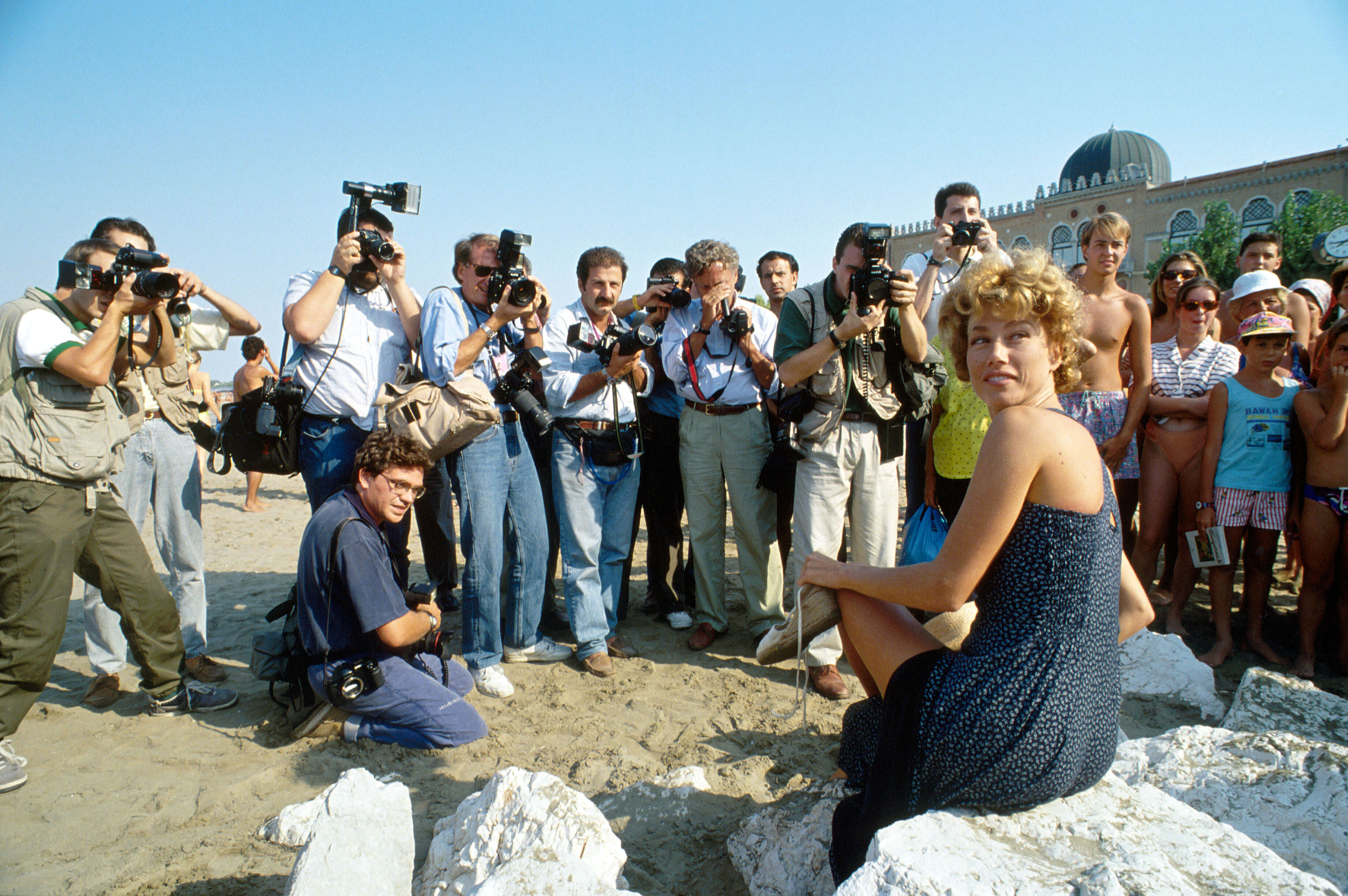 L'attrice Nancy Brilli alla Mostra del Cinema di Venezia del 1988